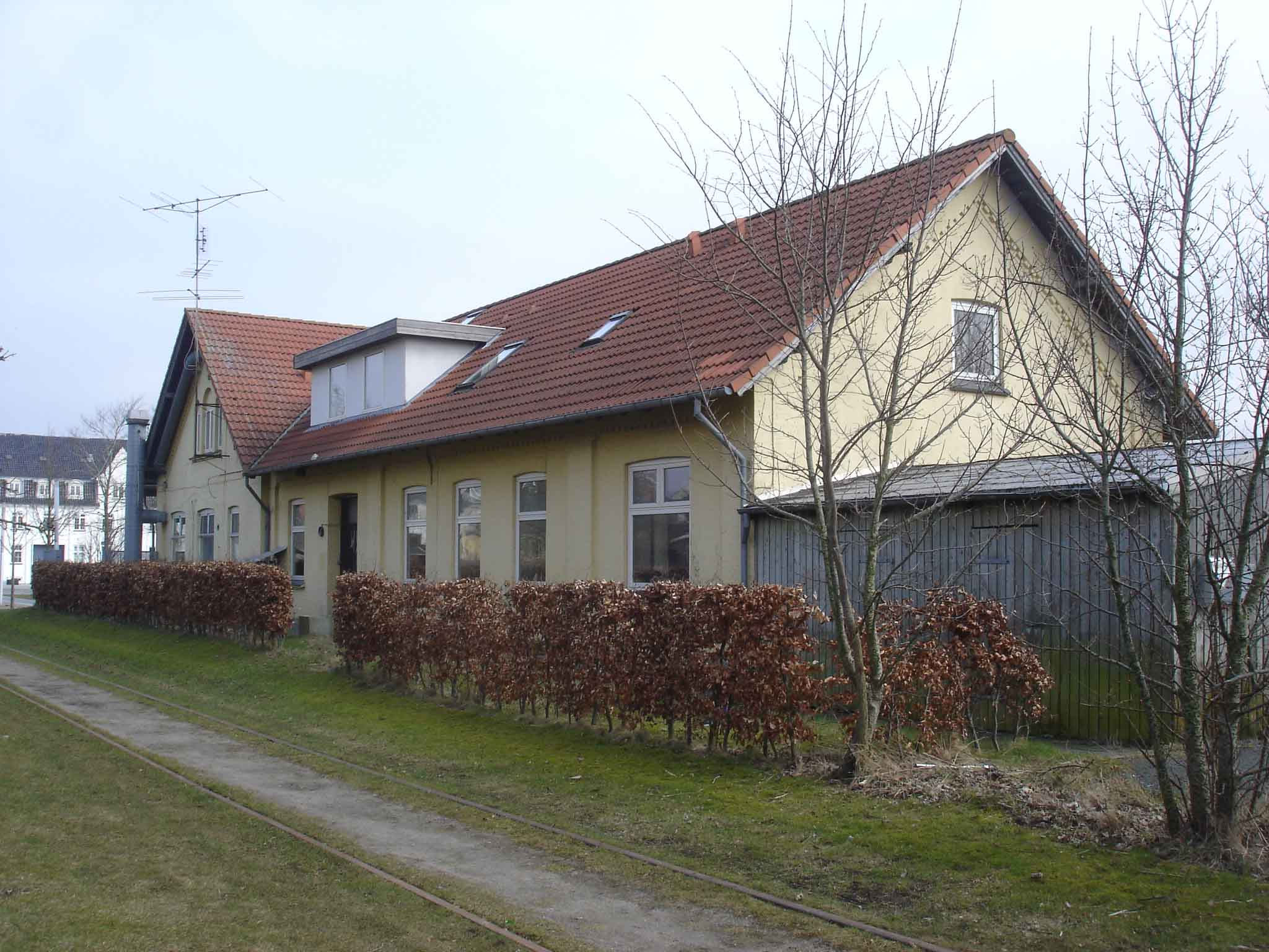 Glamsbjerg Station, sporsiden fra vest